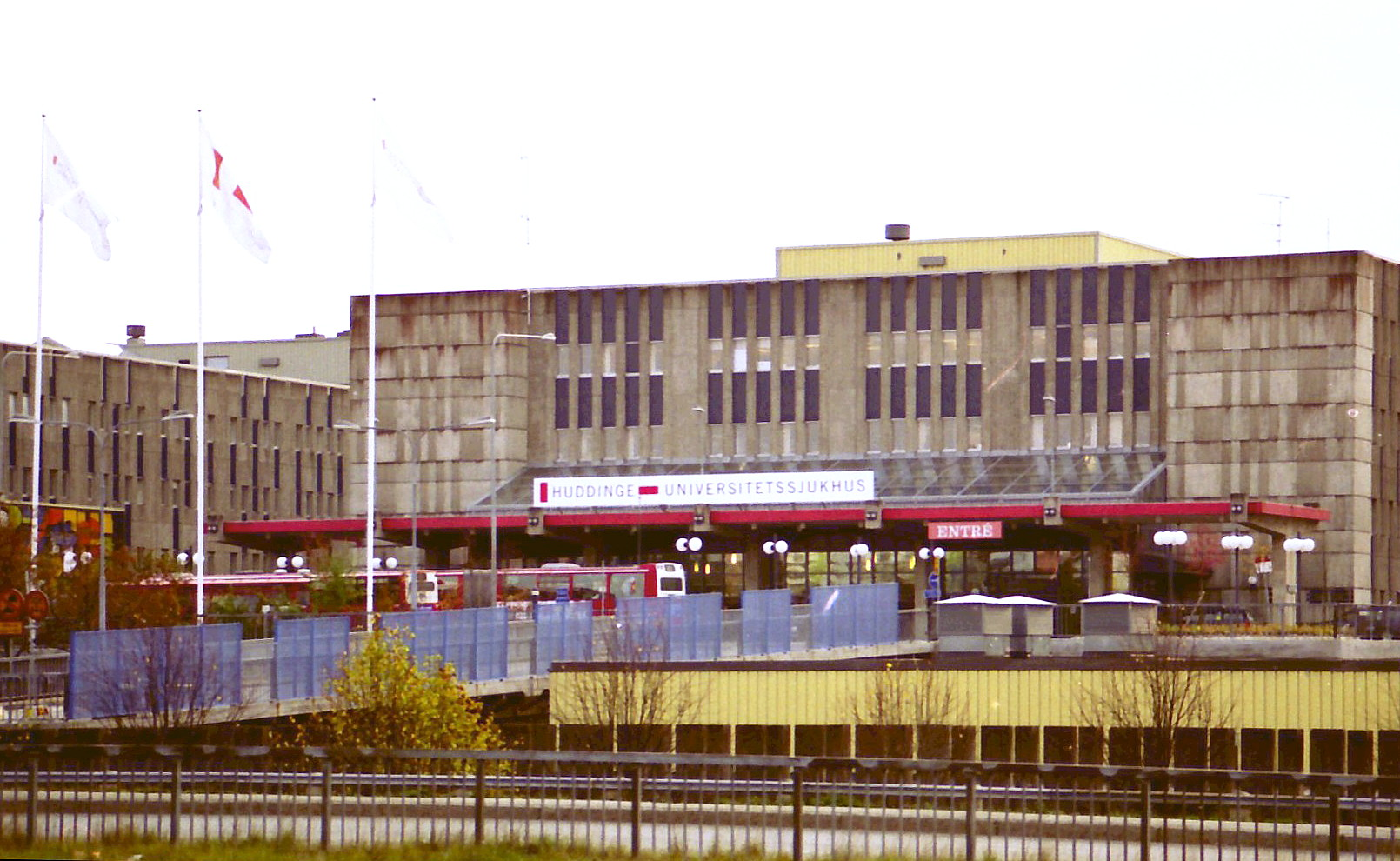 Huddinge Universitetssjukhus år 2000 (numera Karolinska Universitetssjukhuset Huddinge)